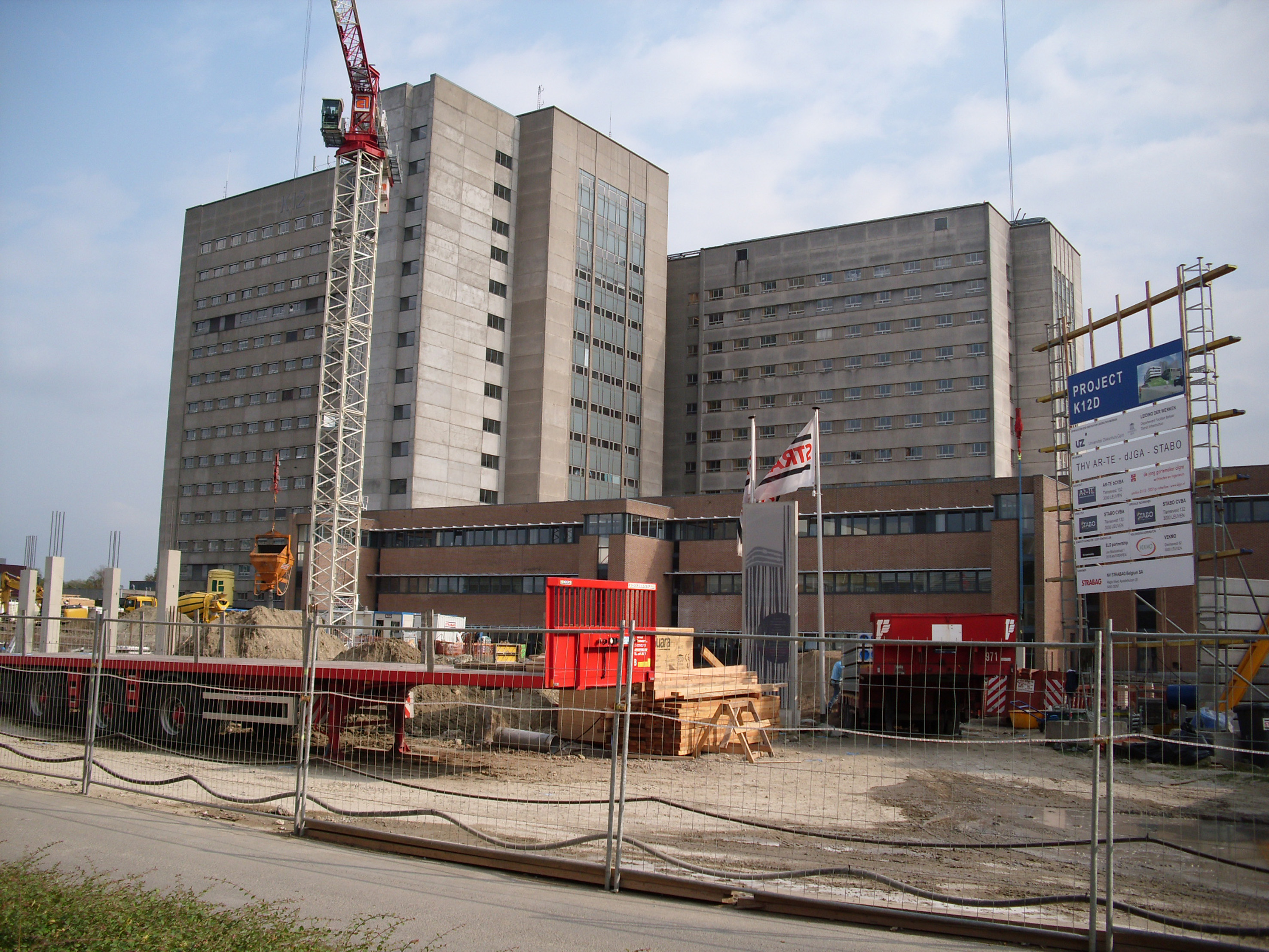 Uitbreiding K12 - UZ Gent - De Pintelaan - Gent - Oost-Vlaanderen - Vlaanderen - België